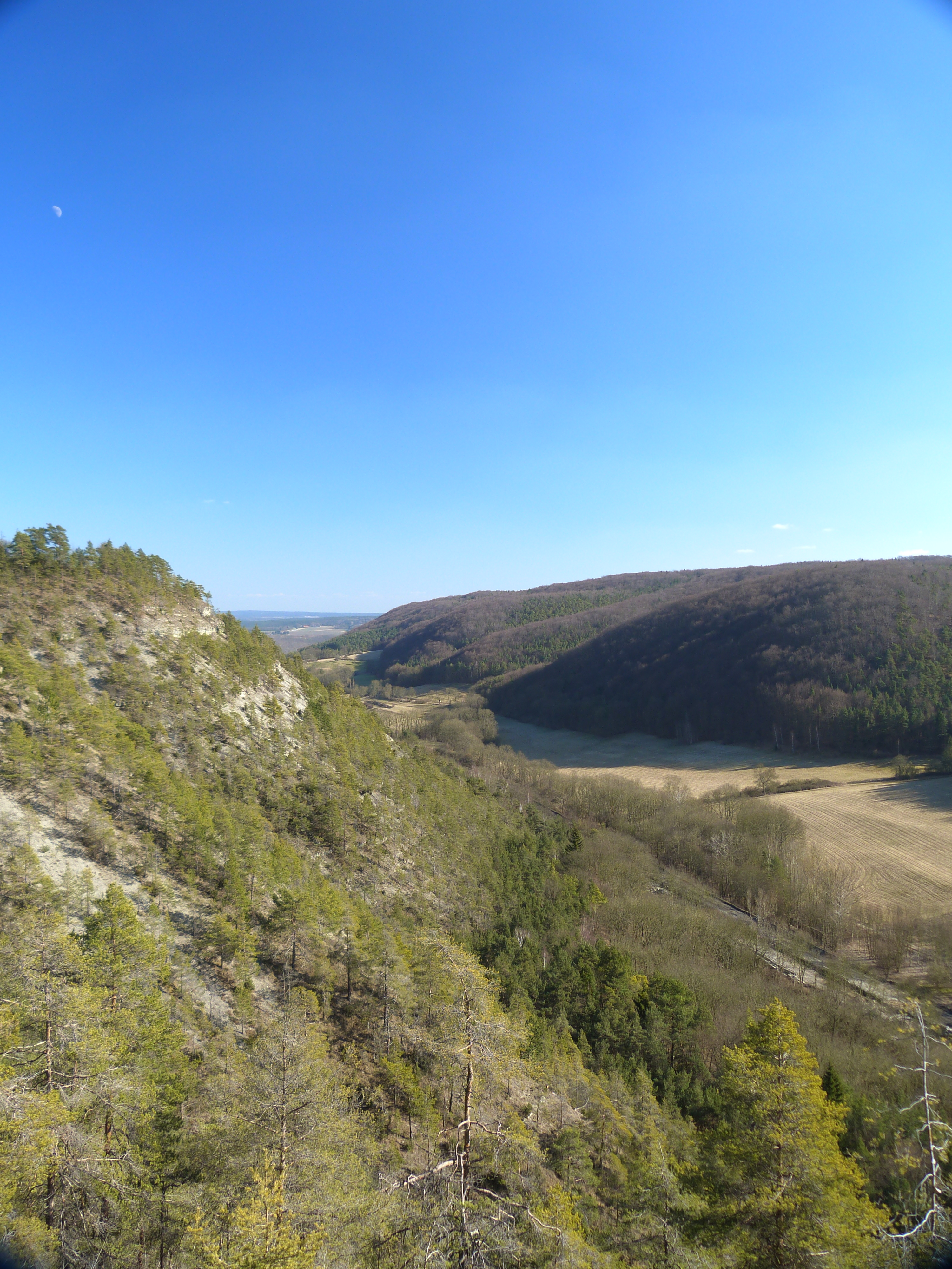 Dieses Foto wurde in Richtung Osten aufgenommen, oberhalb des alten Autobahnverlaufs der A4. Zwischen den Ortschaften Leutra und Pösen.